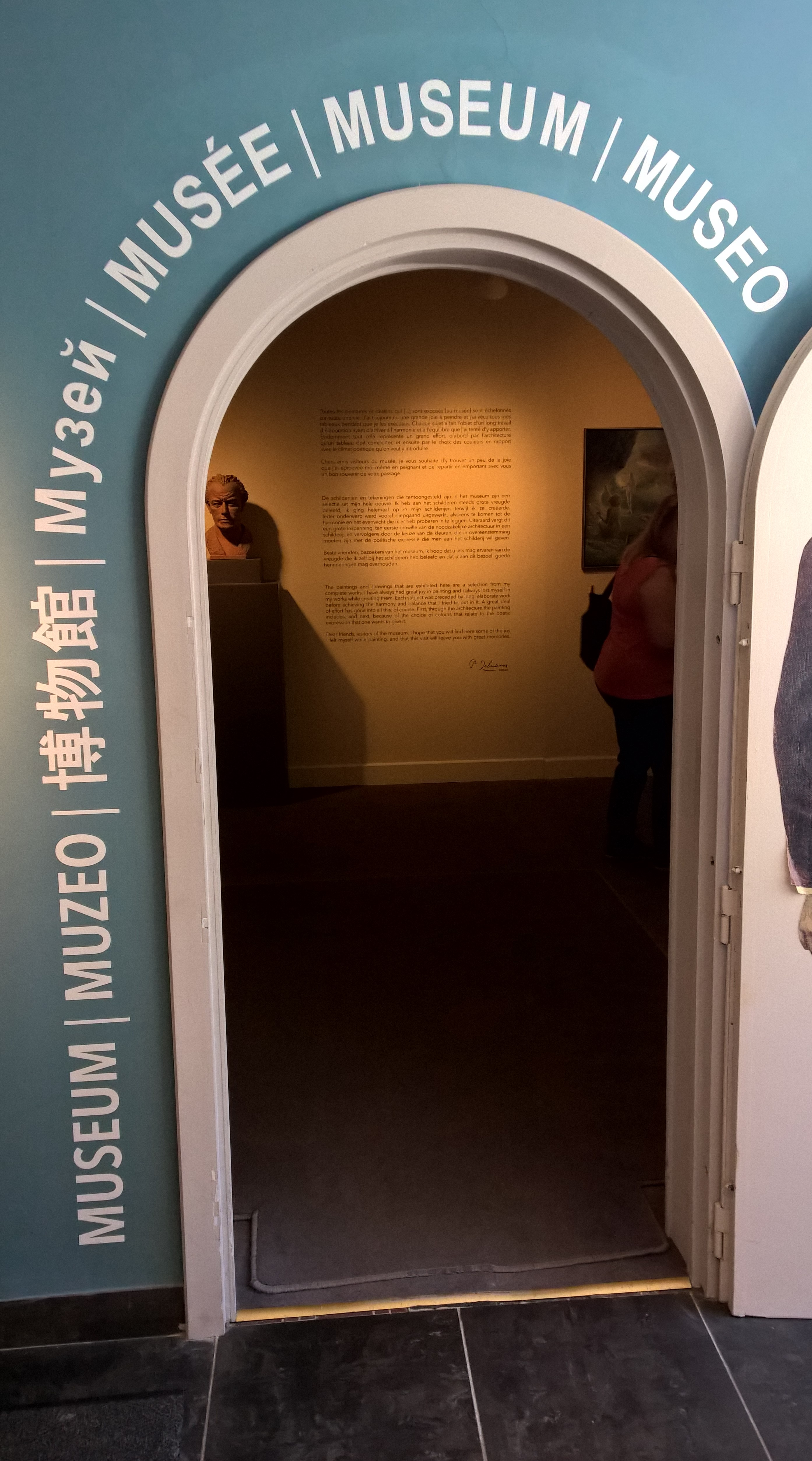 Enirpordo al la ekspoziciejo de la muzeo Paul Delvaux